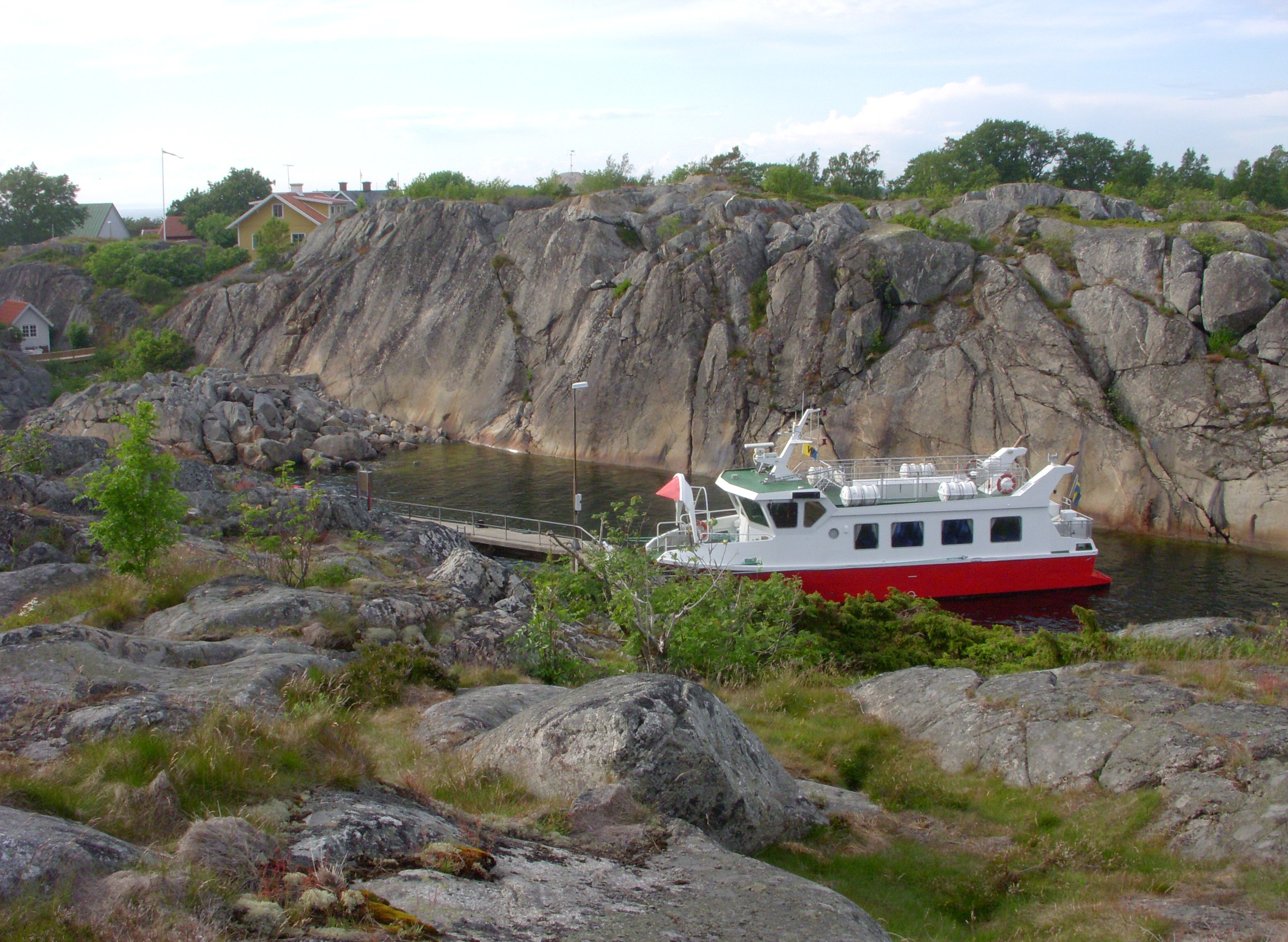 Färjan M/S Stångskär i Östra hamnen, Landsort